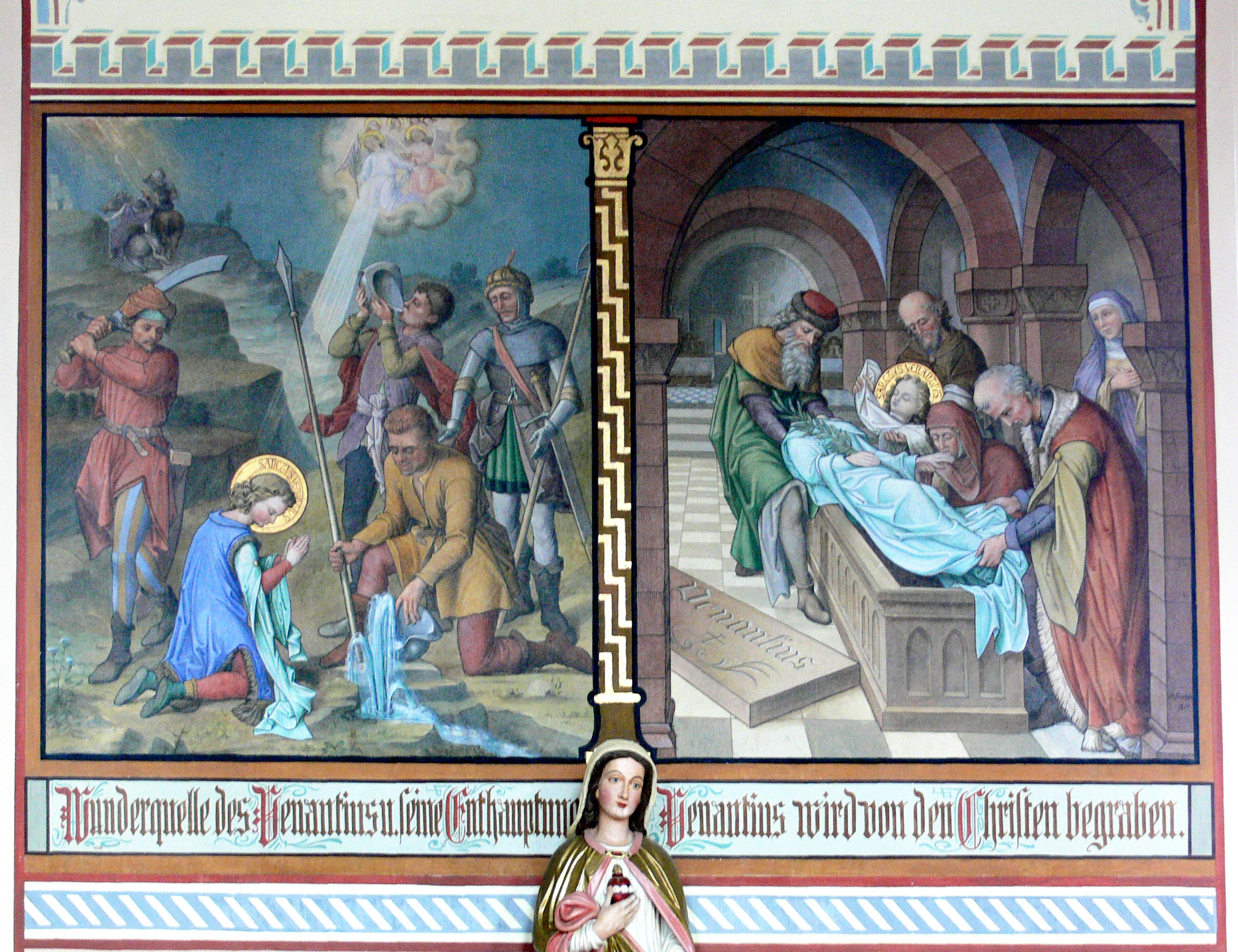 Filialkirche St. Venantius, Pfärrenbach, Gemeinde Horgenzell Wandgemälde im Kirchenschiff: Venantiuslegende